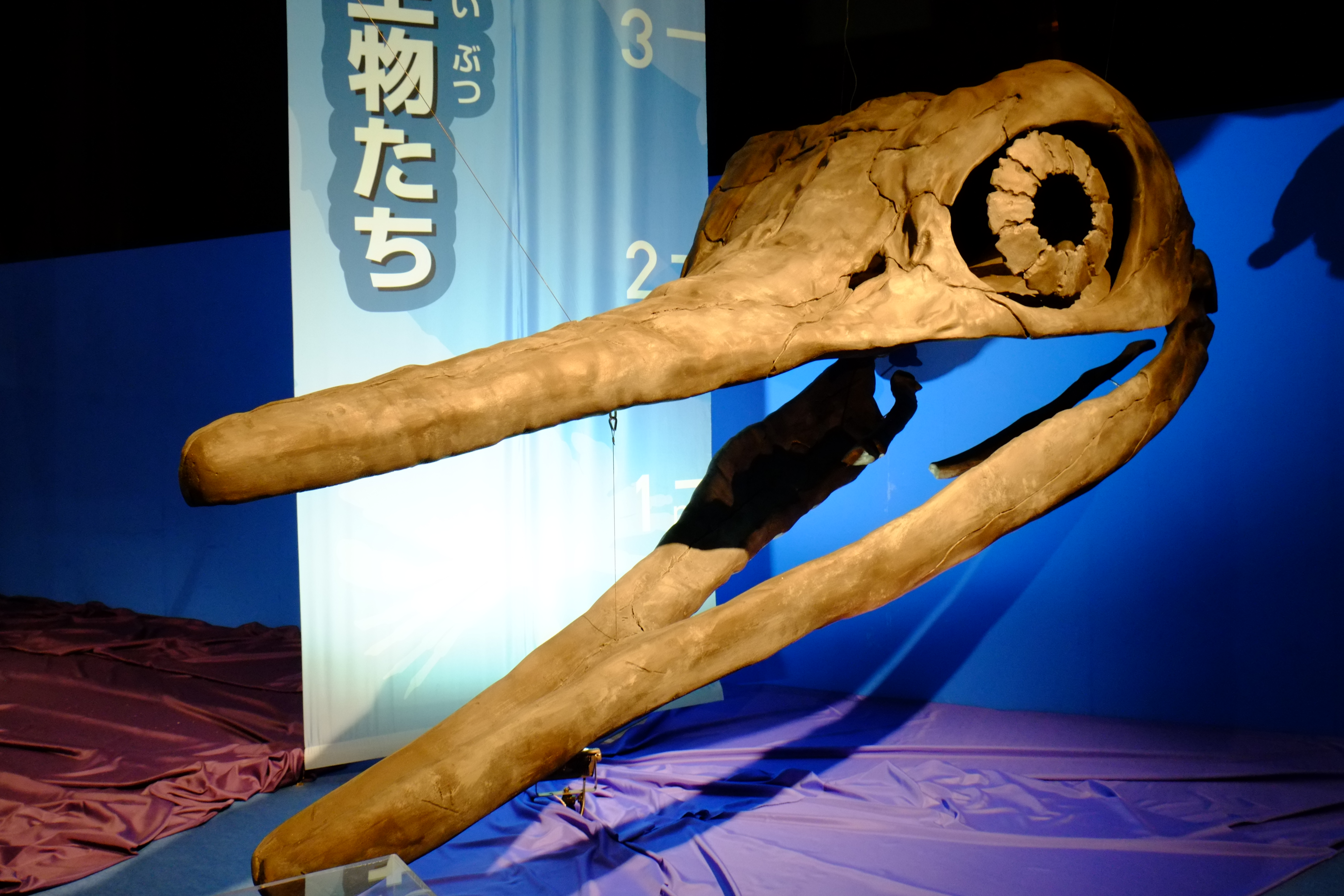 全長約15メートル、20～35トン。魚介好き。 今回のメガ恐竜展は復元図がほとんど無いのが淋しい。